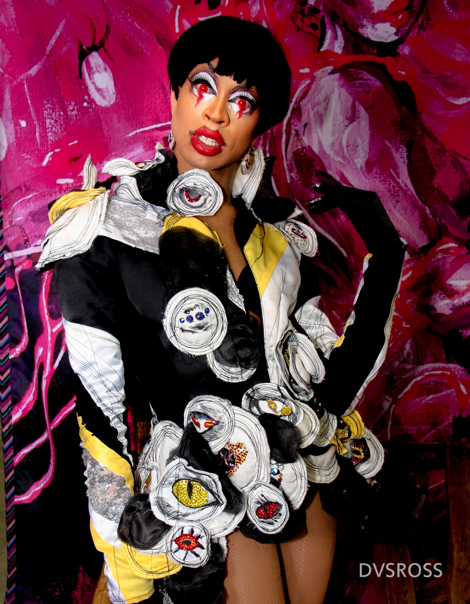 Rupaul DragCon 2019 - Los Angeles